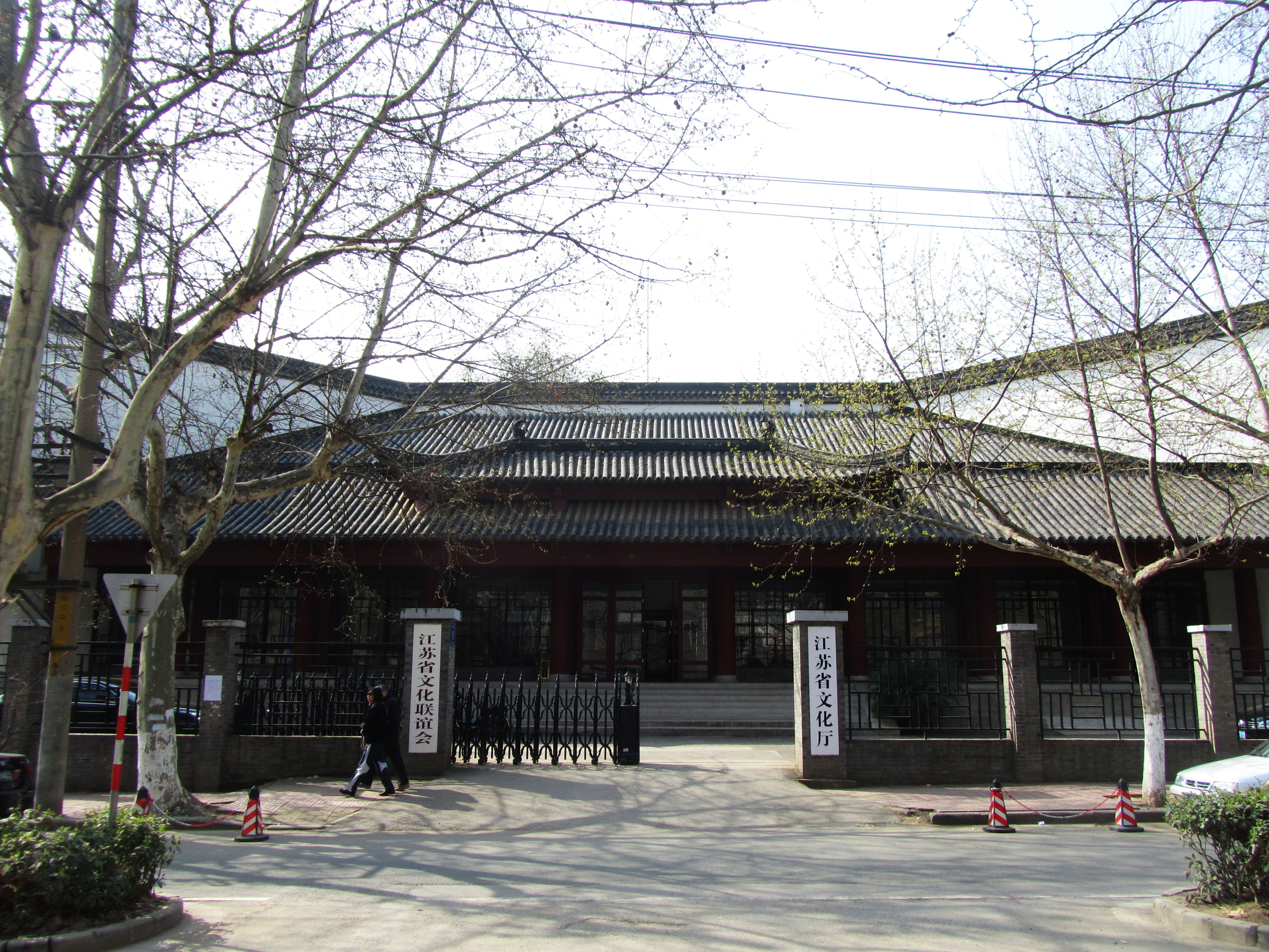 位于南京市龙蟠里9号的江苏省文化厅。